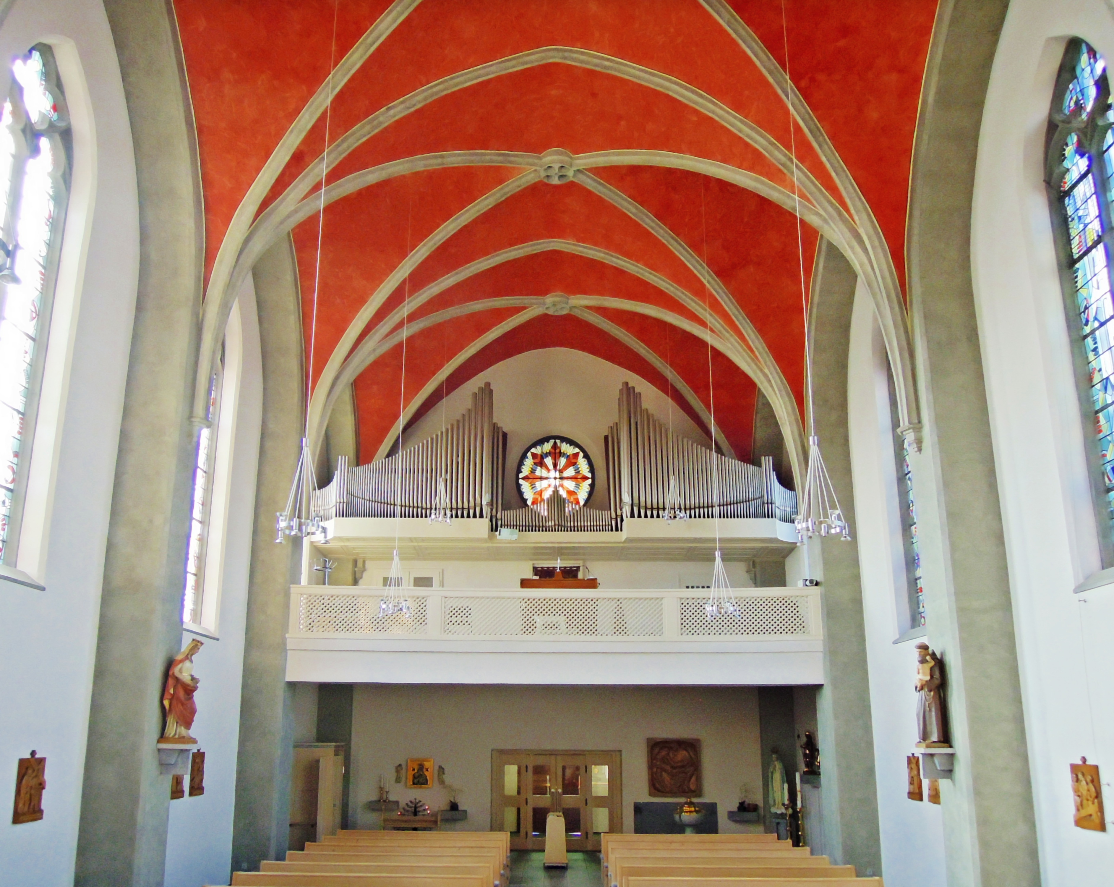 Kath. Kirche St. Pankratius in Beggendorf